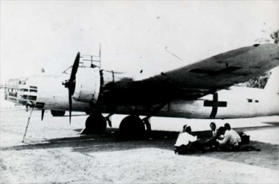 Nakajima Ki 49 Helen